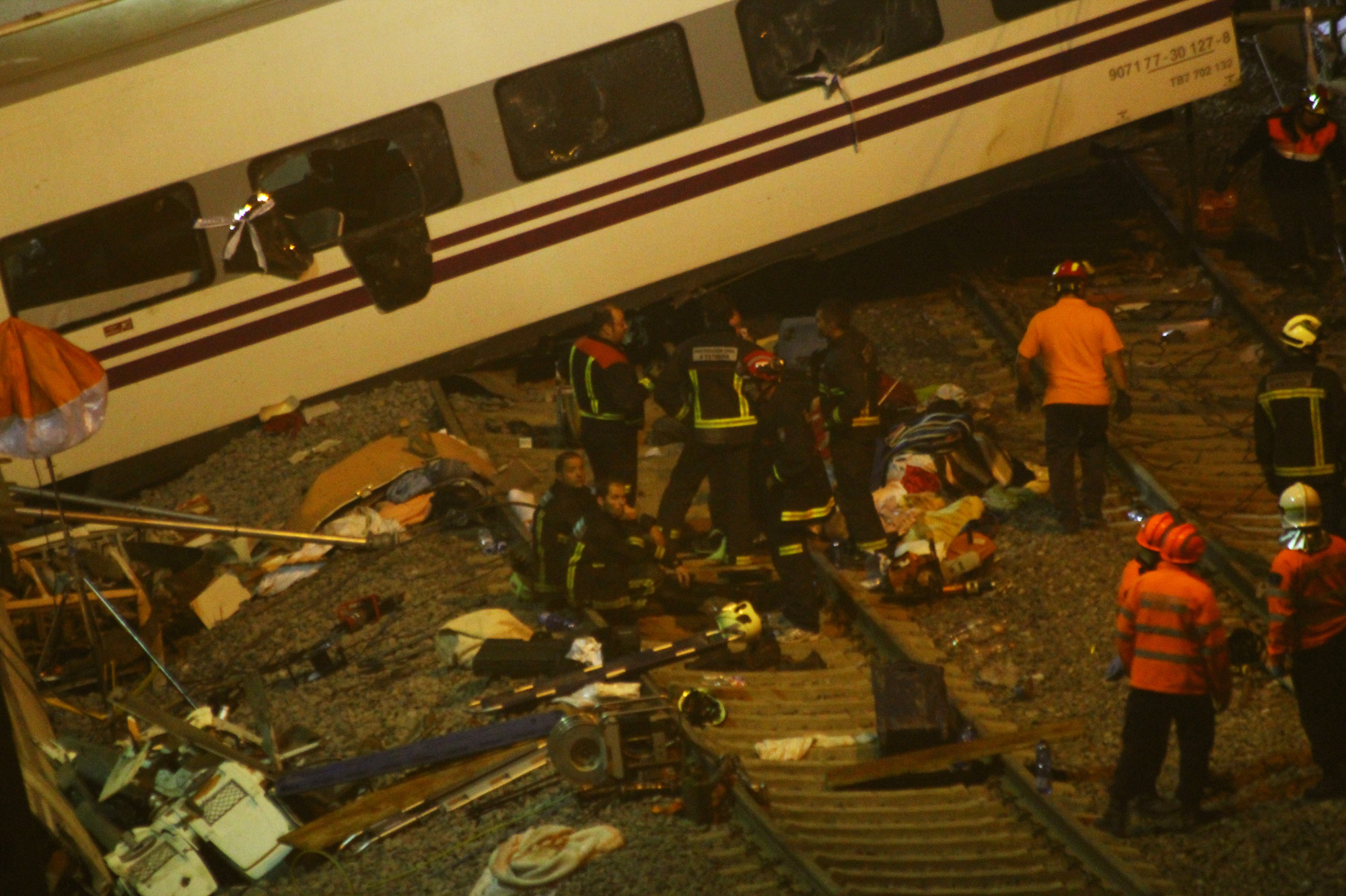 Fotos que hice in situ del accidente ferroviario ocurrido este 24 de julio cerca de Santiago de Compostela. En el momento de escribir estas líneas ya se cuentan 65 muertos. Es el peor accidente ferroviario de España en los últimos 40 años. Tragedy in Santiago de Compostela Photos I made on-site of the train crash on July 24 near Santiago de Compostela. At the time of writing are counted 65 dead. It is the worst rail accident in Spain in the last 40 years.